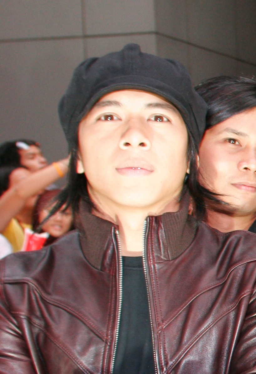 Ariel (Nazril Irham) from Peterpan (Indonesian Band) at Bangkok,Thailand